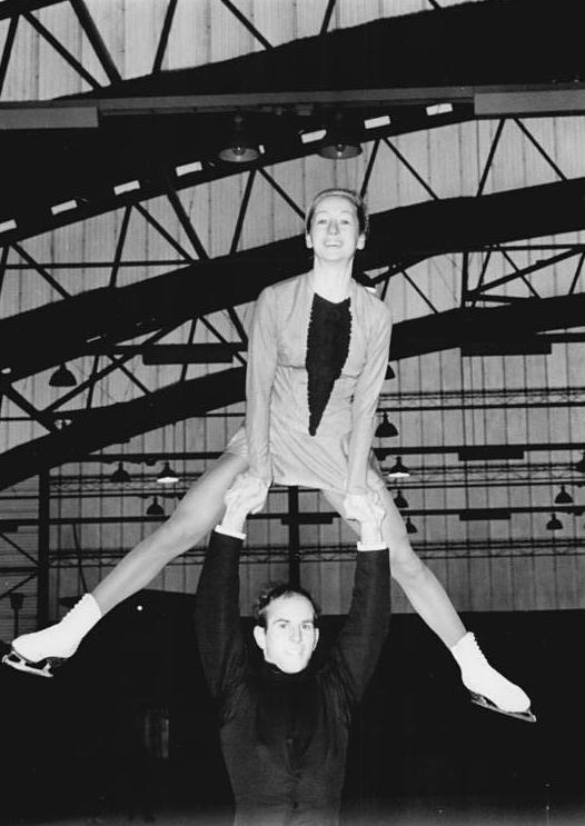 Heidi Steiner, Heinz-Ulrich Walther Zentralbild Kohls 9.1.1966 Karl-Marx-Stadt: Deutsche Meisterschaften im Eiskunstlaufen. Heidi Steiner und Heinz-Ulrich Walther (SC Dynamo Berlin) liegen nach dem ersten Wettkampftag (8.1.1966) bei den Paaren kanpp in Führung (Platzziffer 12,3 - 10,44 Punkten).